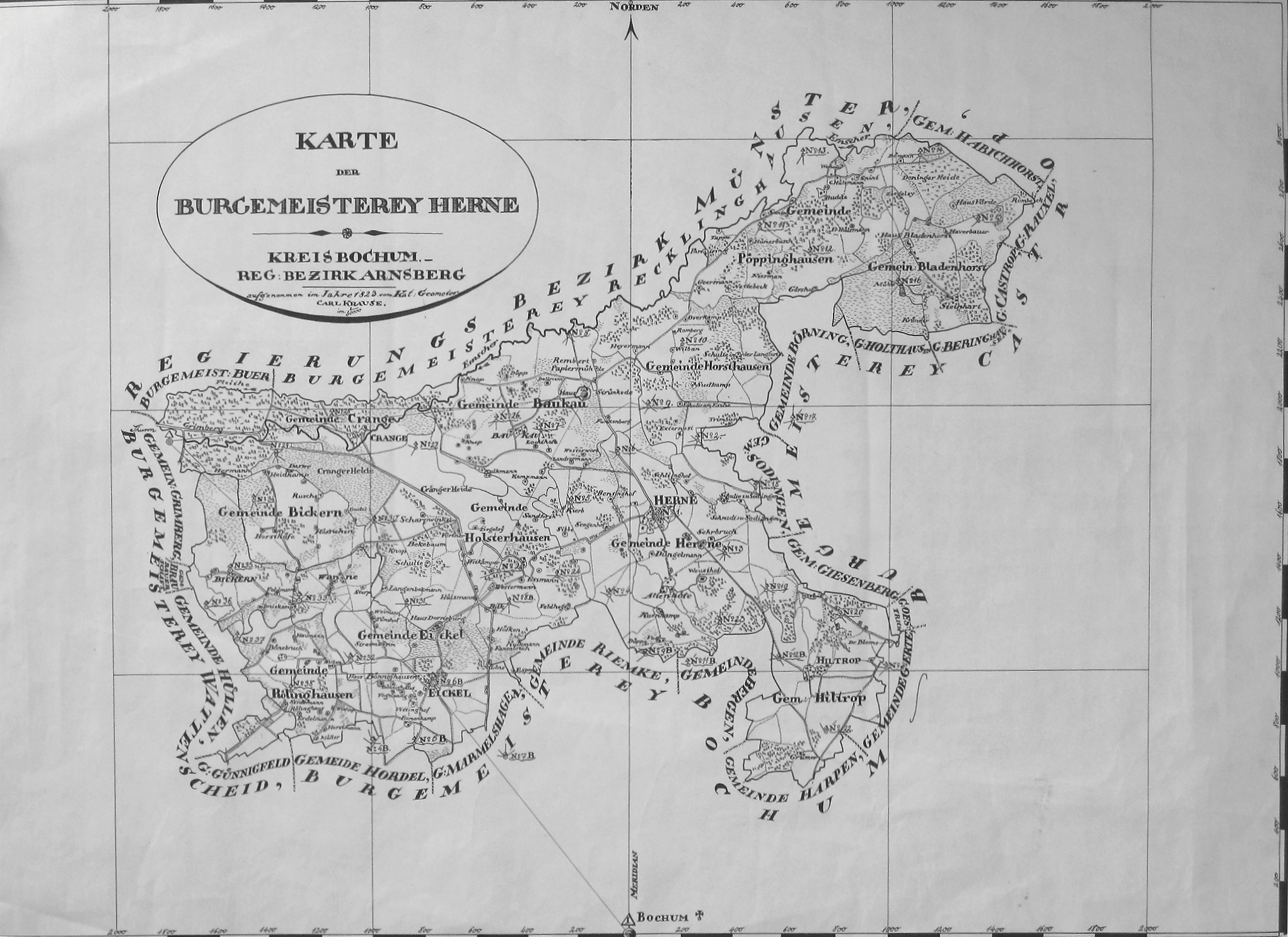 Stadtarchiv Herne: Karte der Burgemeisterey Herne aus dem Jahr 1823.